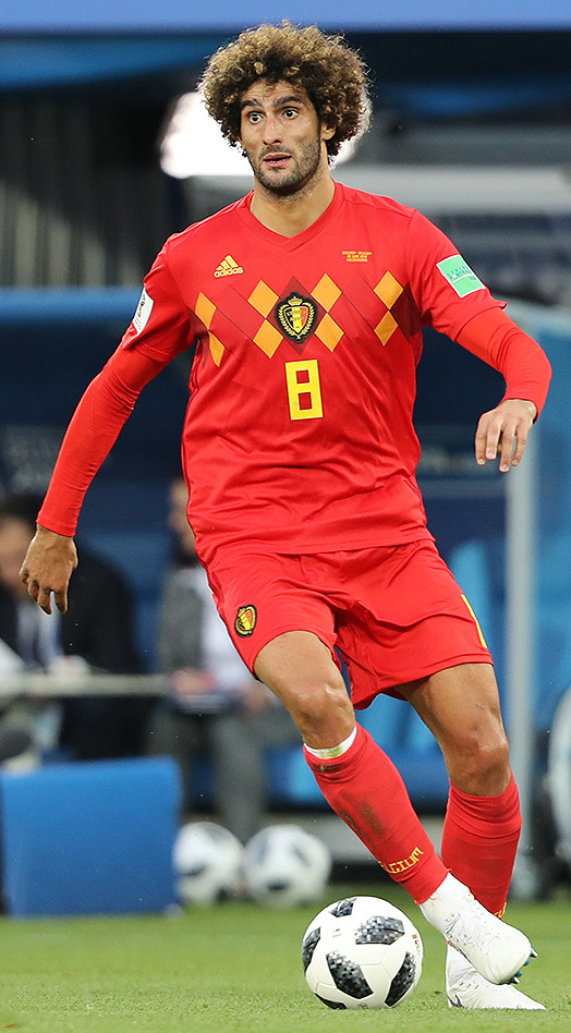 Второй состав сборной Бельгии оказался сильнее резерва англичан на ЧМ-2018